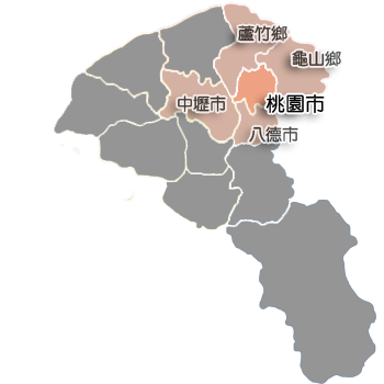 桃園縣桃園市行政區劃。